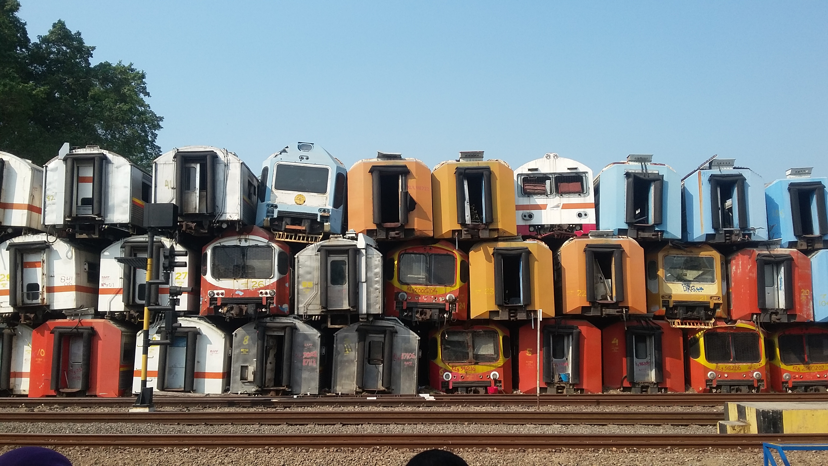 Tumpukan KRL afkir di stasiun Purwakarta